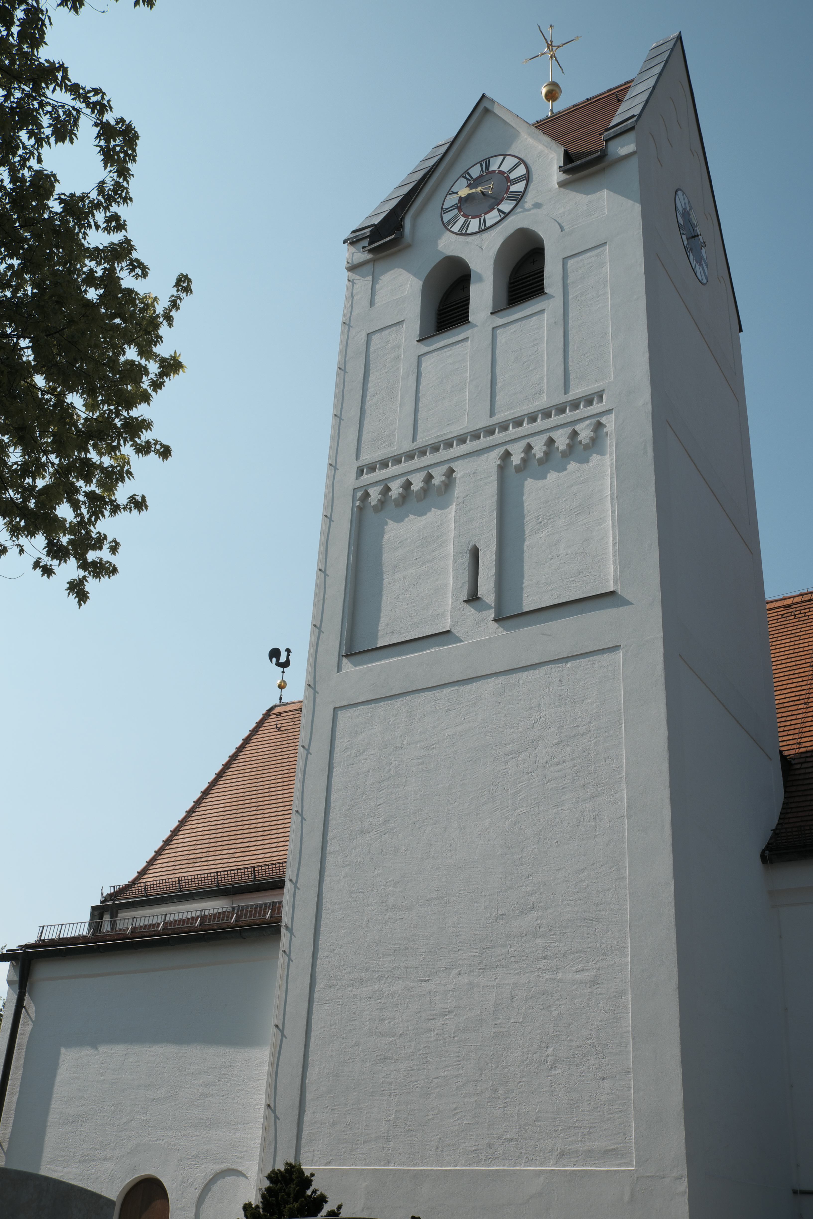 Alte katholische Pfarrkirche St. Nikolaus in Neuried (bei München) im Landkreis München (Bayern, Deutschland), Turm mit Satteldach